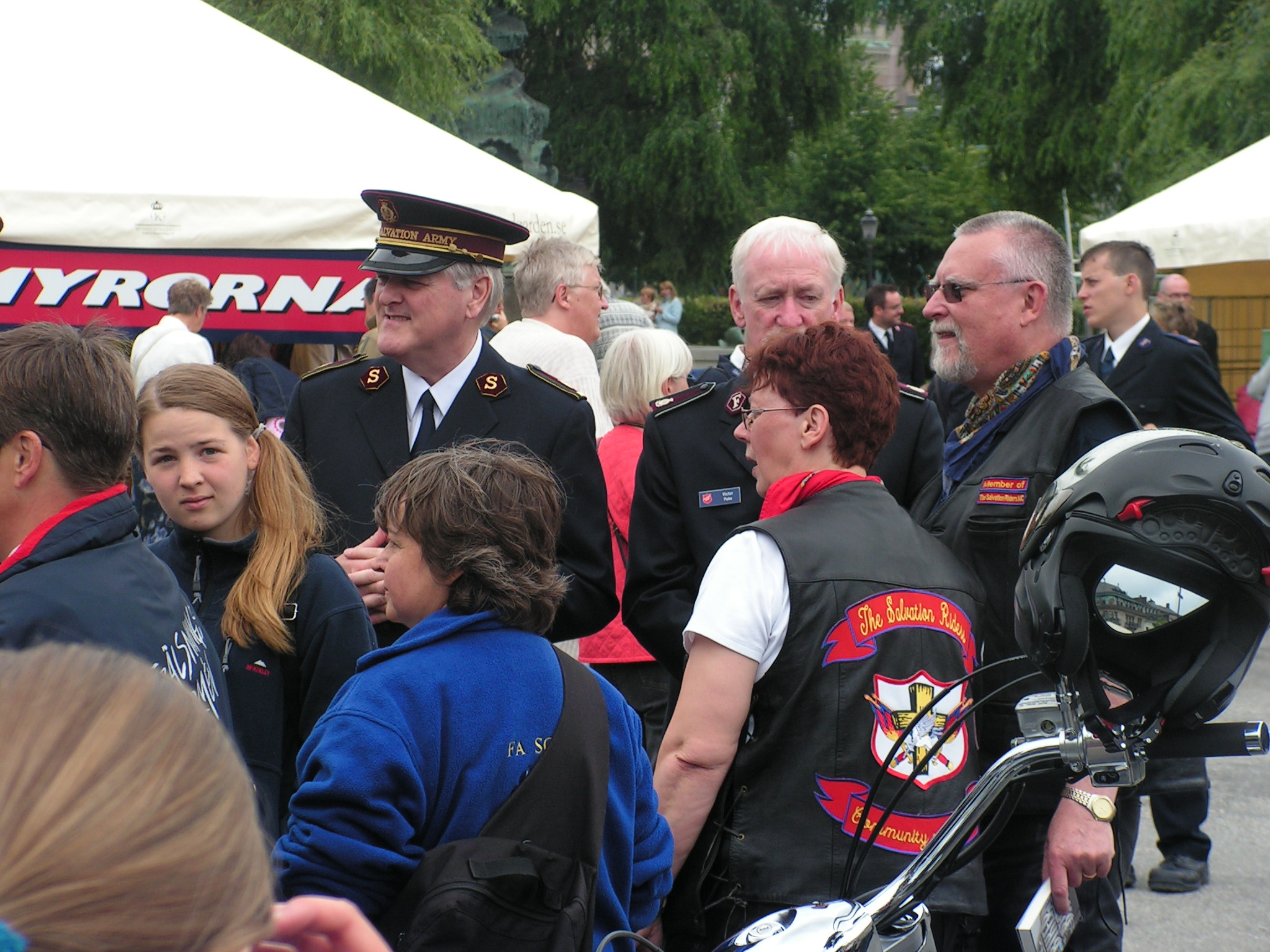 Medlemmar av Salvation Riders svenska avdelning i samtal med Frälsningsarméns general Shaw Clifton och kommendör Victor Poke